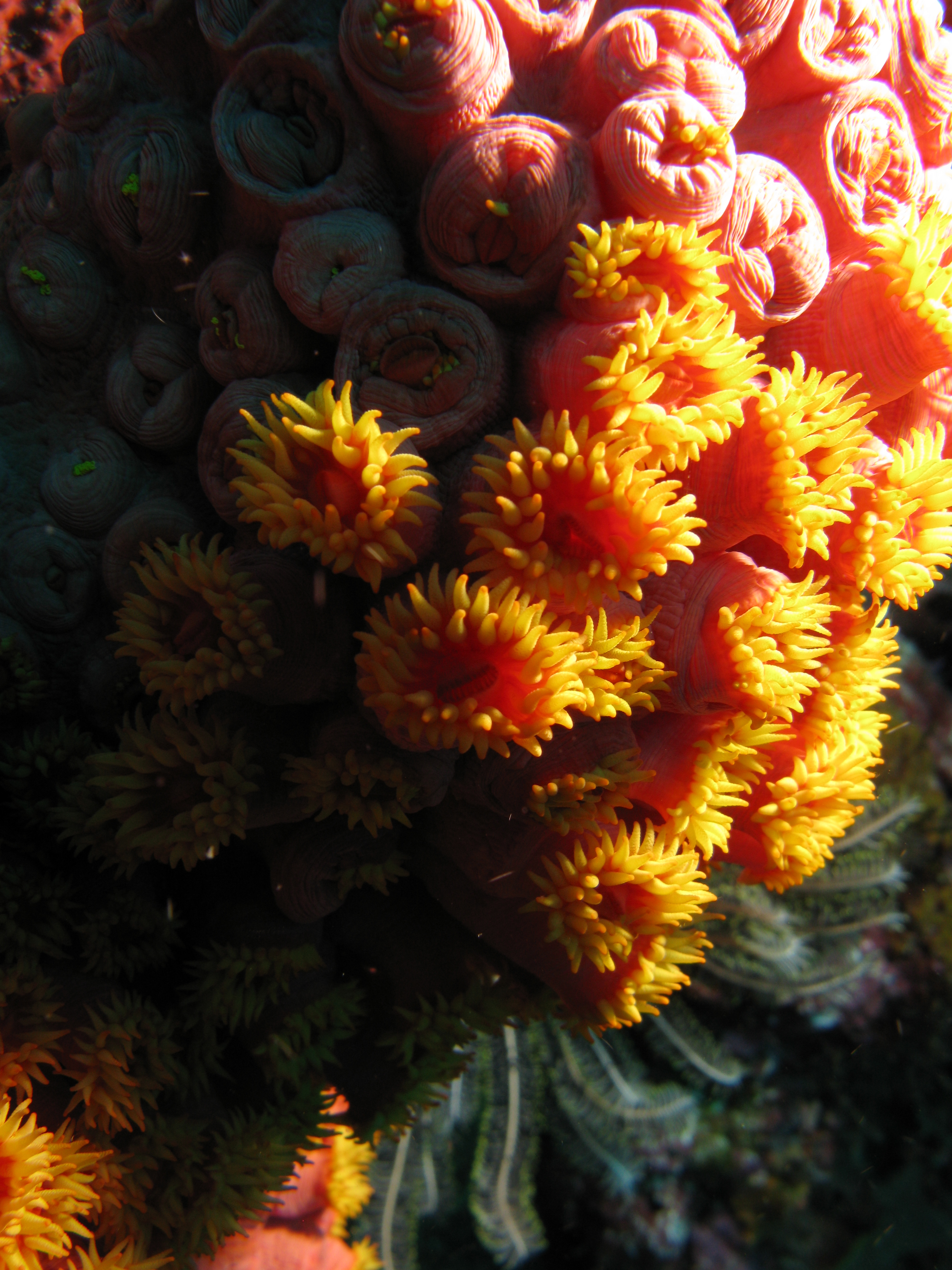 Dendrophyllia gracilis, Indonesia, 2009